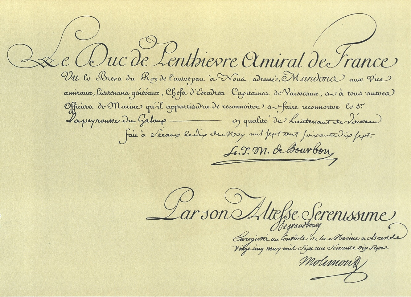 Copie du document donnant le grade de lieutenant de vaisseau à La Pérouse en 1777. Collection famille Fleuriot de Langle.